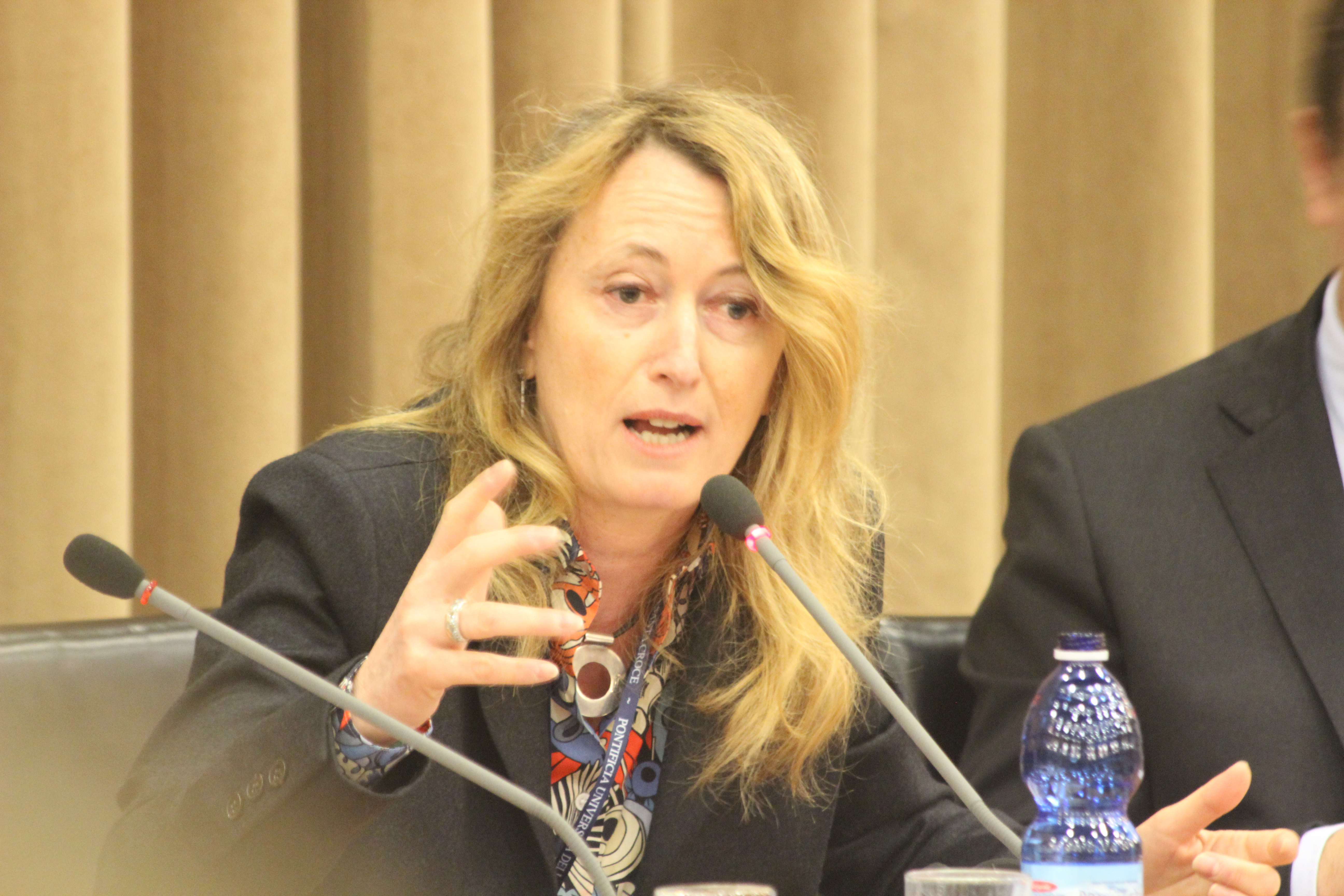 Elisabetta Piqué, periodista argentina corresponsal en el Vaticano, durante una conferencia en Roma el 2014.